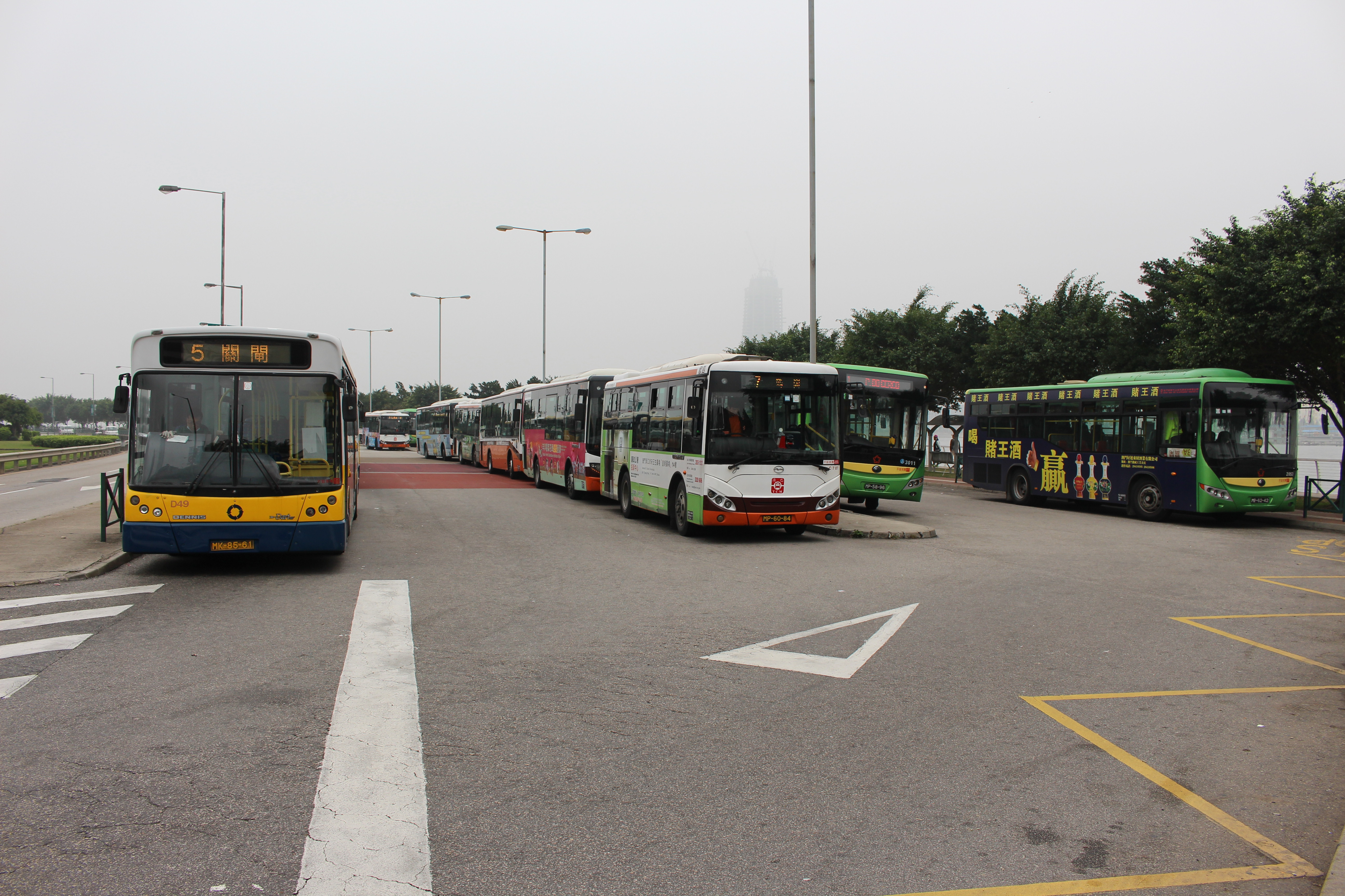 2015年3月的媽閣總站一角.